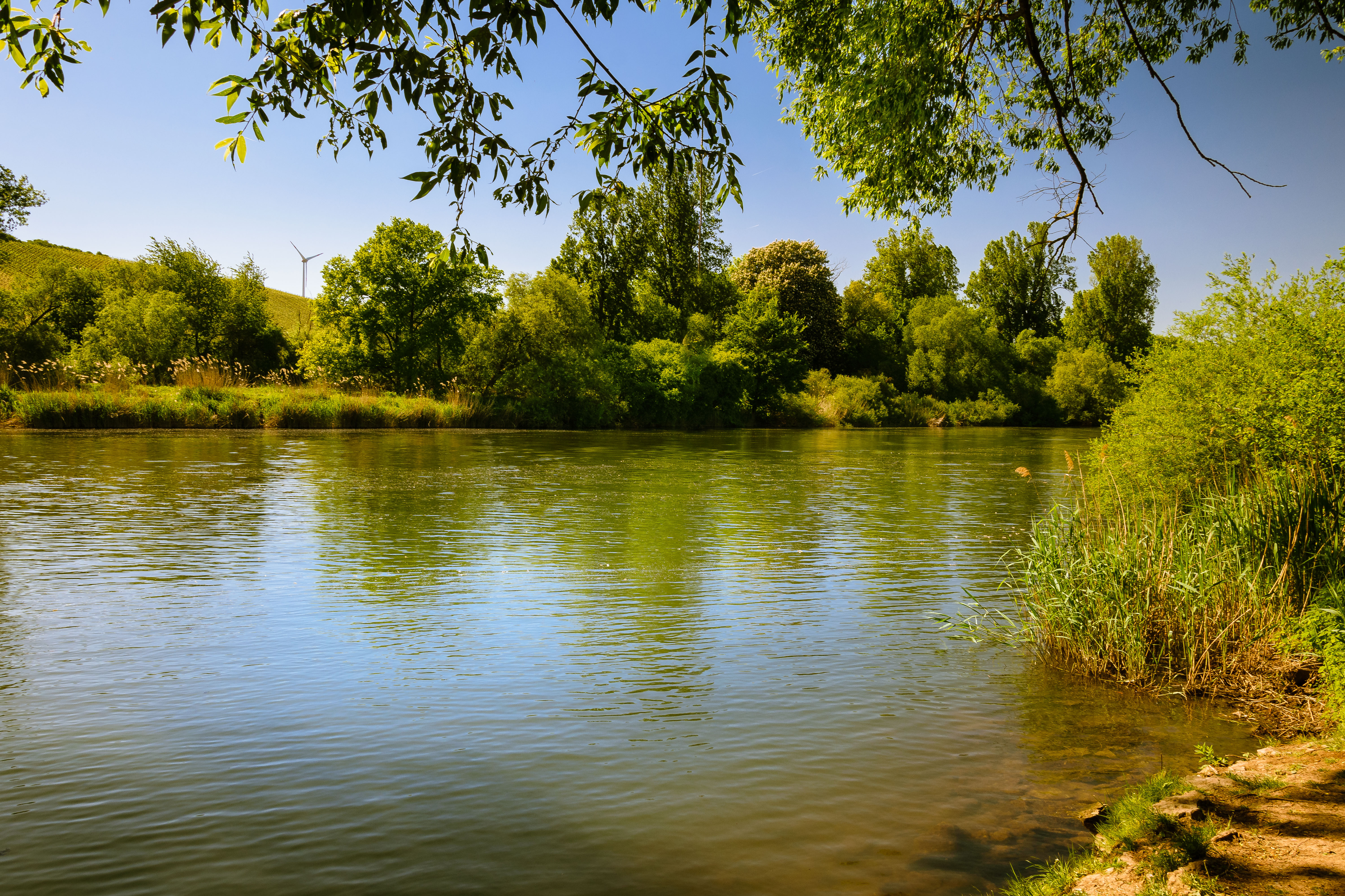 Das Foto zeigt die Mainaue zwischen Sommerach und Köhler (Kennung: NSG-00500.01; WDPA ID: 164554)